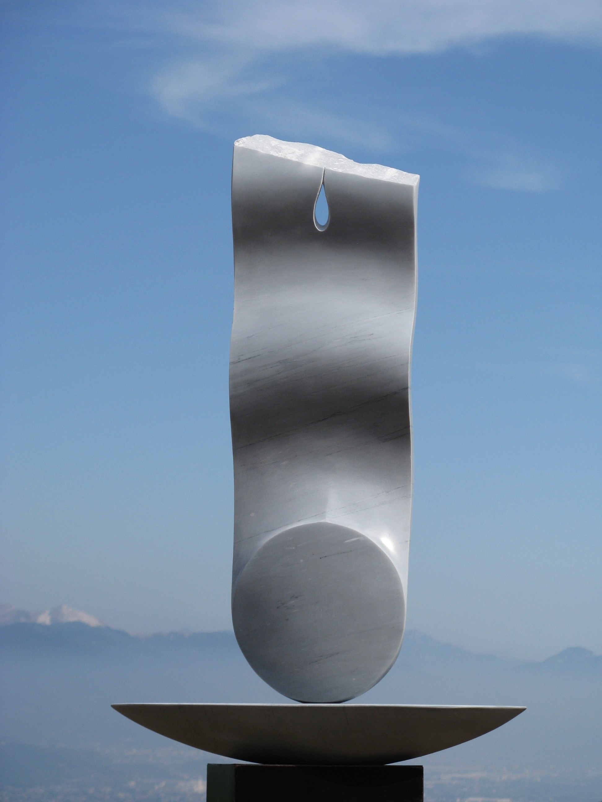 緒方 良信「昇陽」